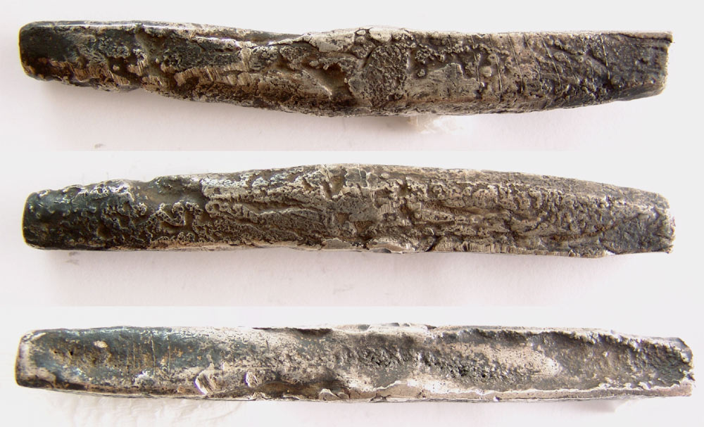 Новгородська Гривня з селища в районі Копорья